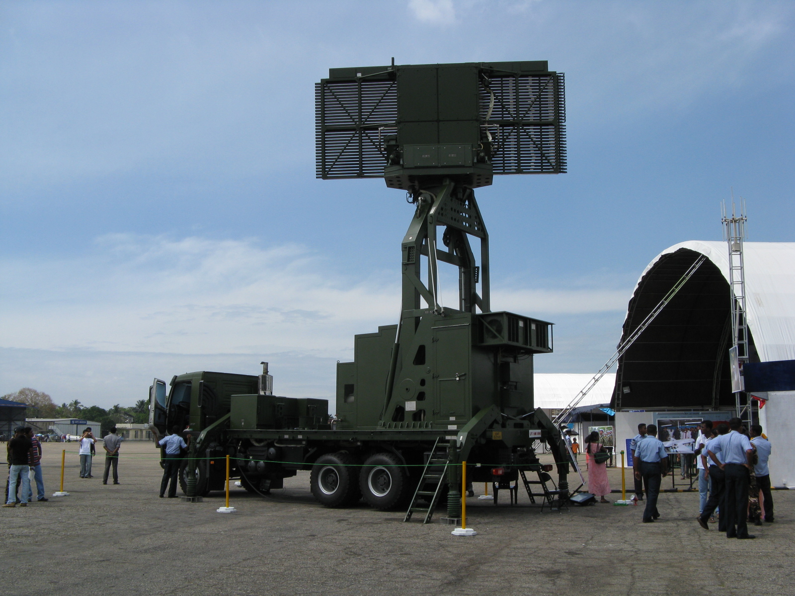 CETC YLC-18 3D Radar - Sri Lanka Air Force